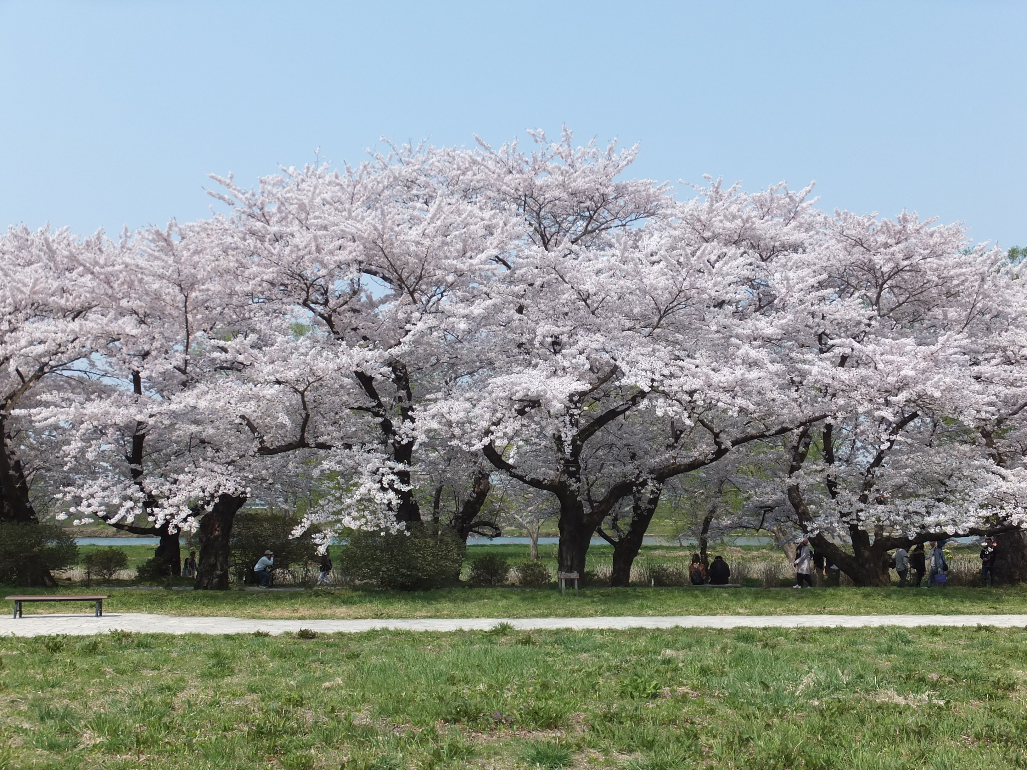 満開を迎えた北上展勝地の桜